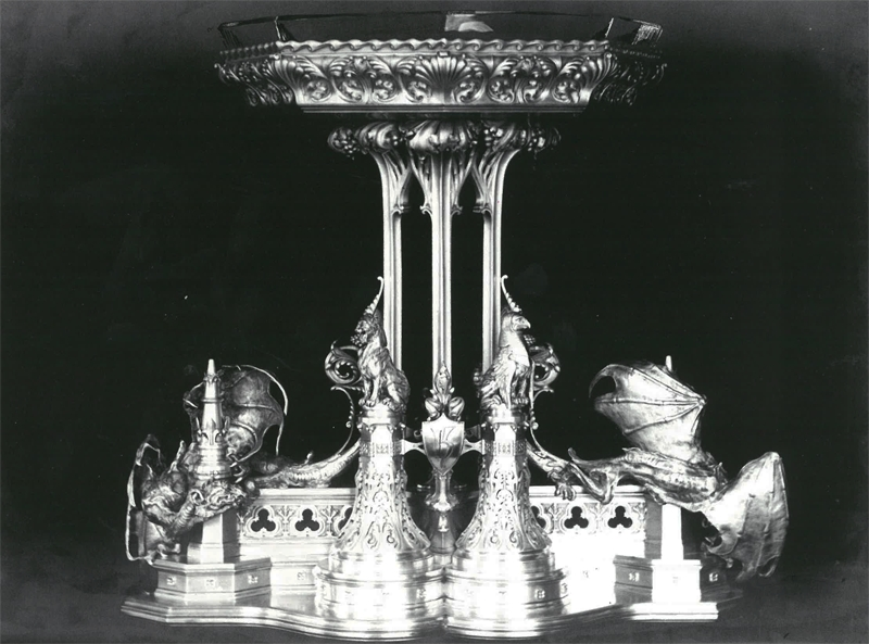 Waza z zastawy Kelchów wykonanej przez Faberge. Fot. z 1900 r.